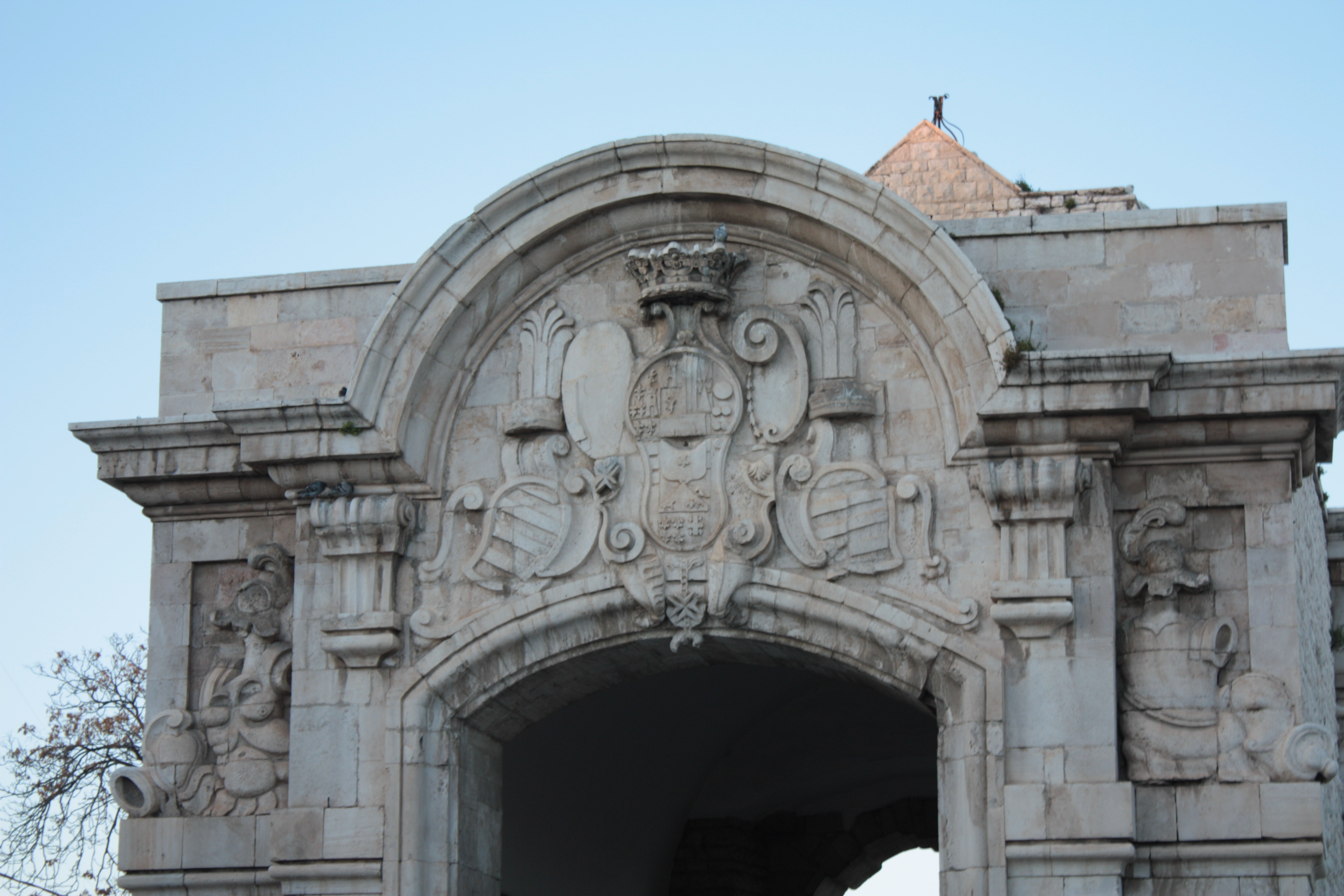 Barletta: Porta Marina - Dettaglio della parte superiore dell'arco